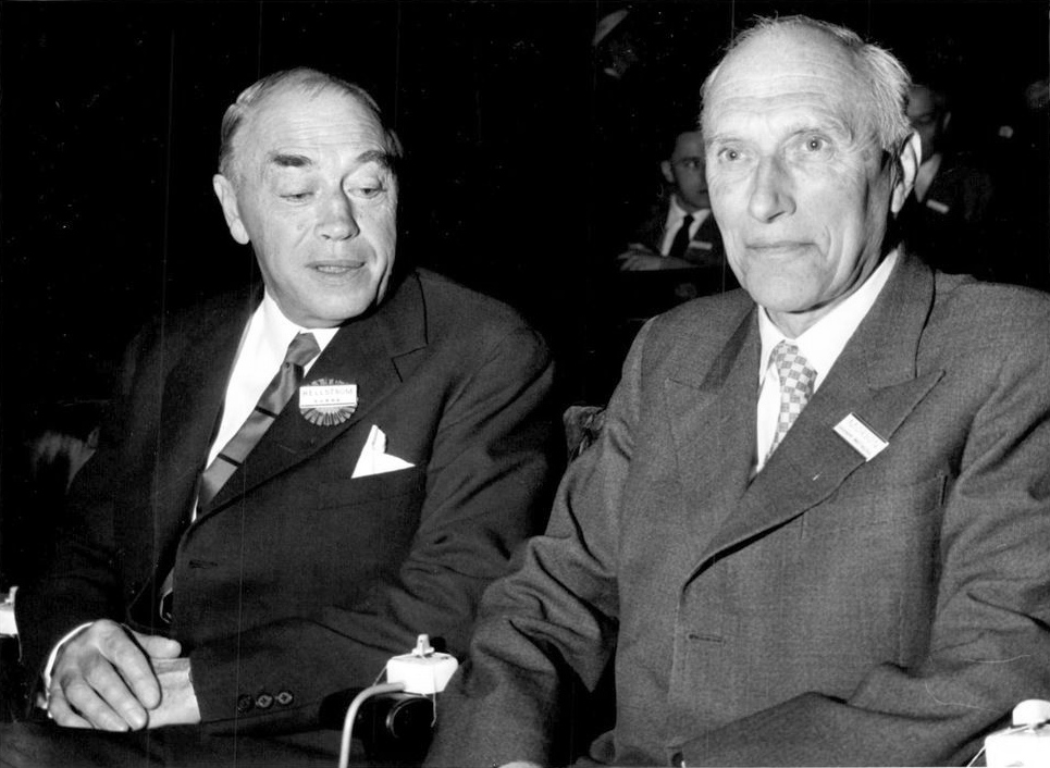 Urologkongress i Konsterthuset: Dr. John Hellström, Sverige, och mr. A. Clifford Morson.